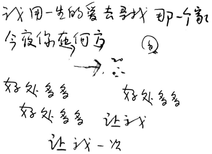 Xenoglosia